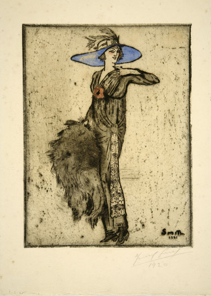 Ready (1912) Aiguafort i aiguatinta a color sobre paper 23,3 x 17,5 cm